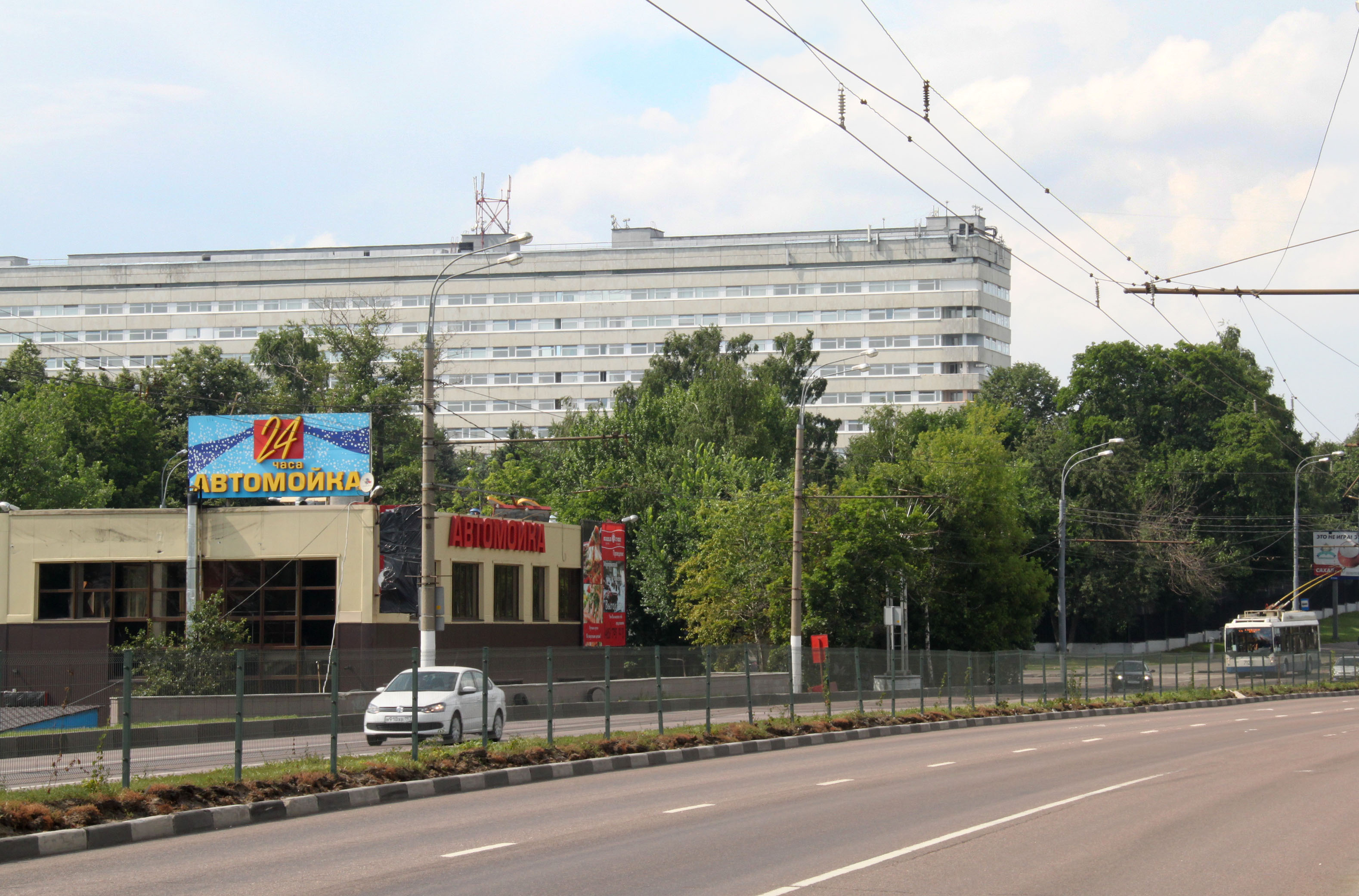 Бывшая больница ЗИЛа на Бакинской улице Москвы (ныне ГКБ №12)